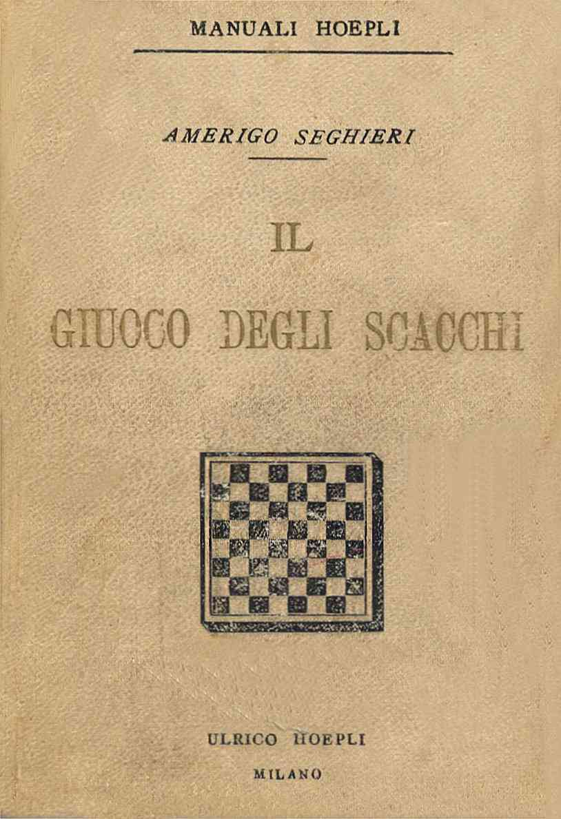 Il giuoco degli scacchi manuale pratico di Amerigo Seghieri 1a edizione 1892 editore Ulrico Hoepli Milano - serie Manuali Hoepli